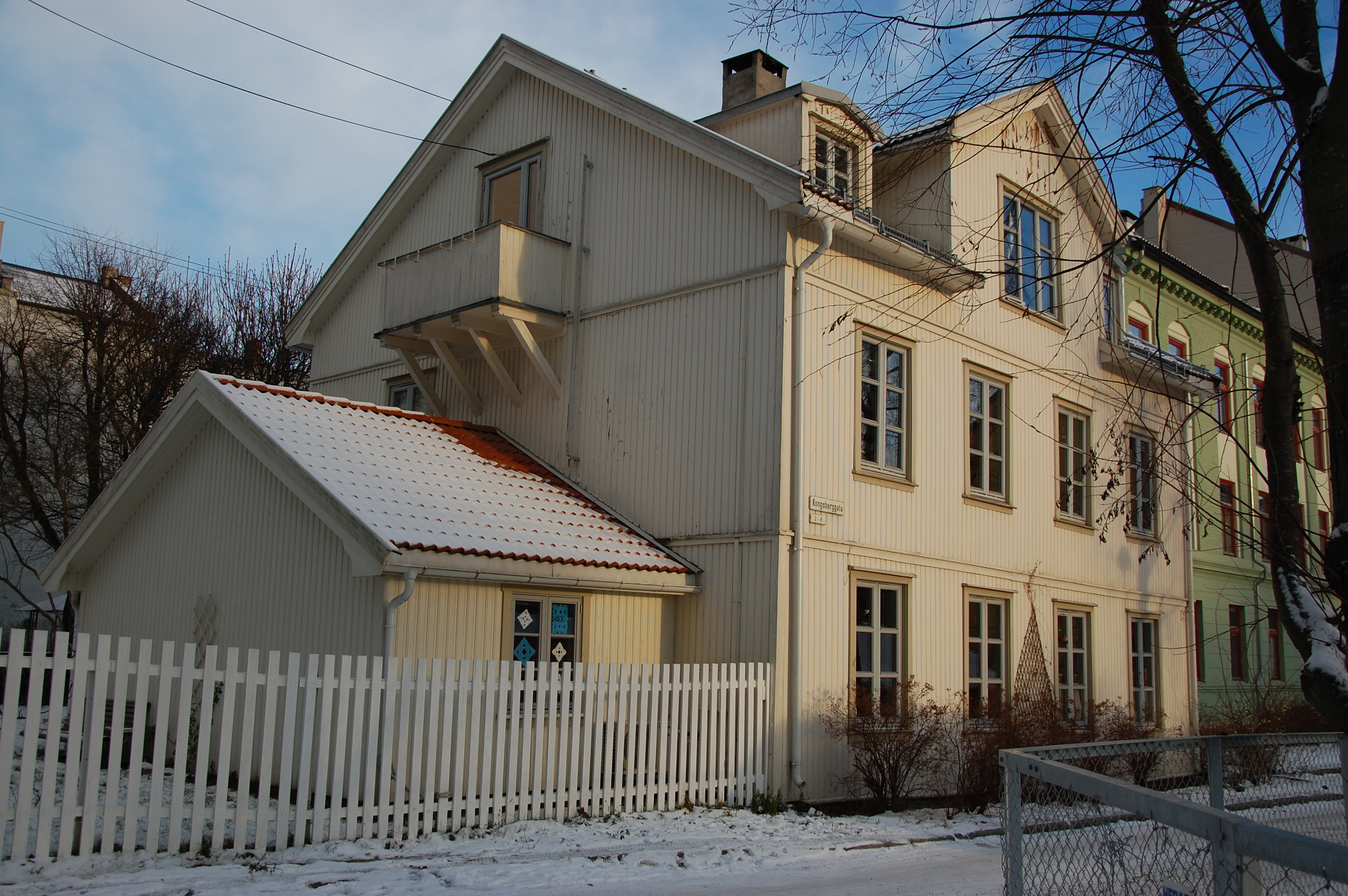 Kongsberggata 2 på Bjølsen i Oslo, boligeiendom - Tidl. Bjølsen skole